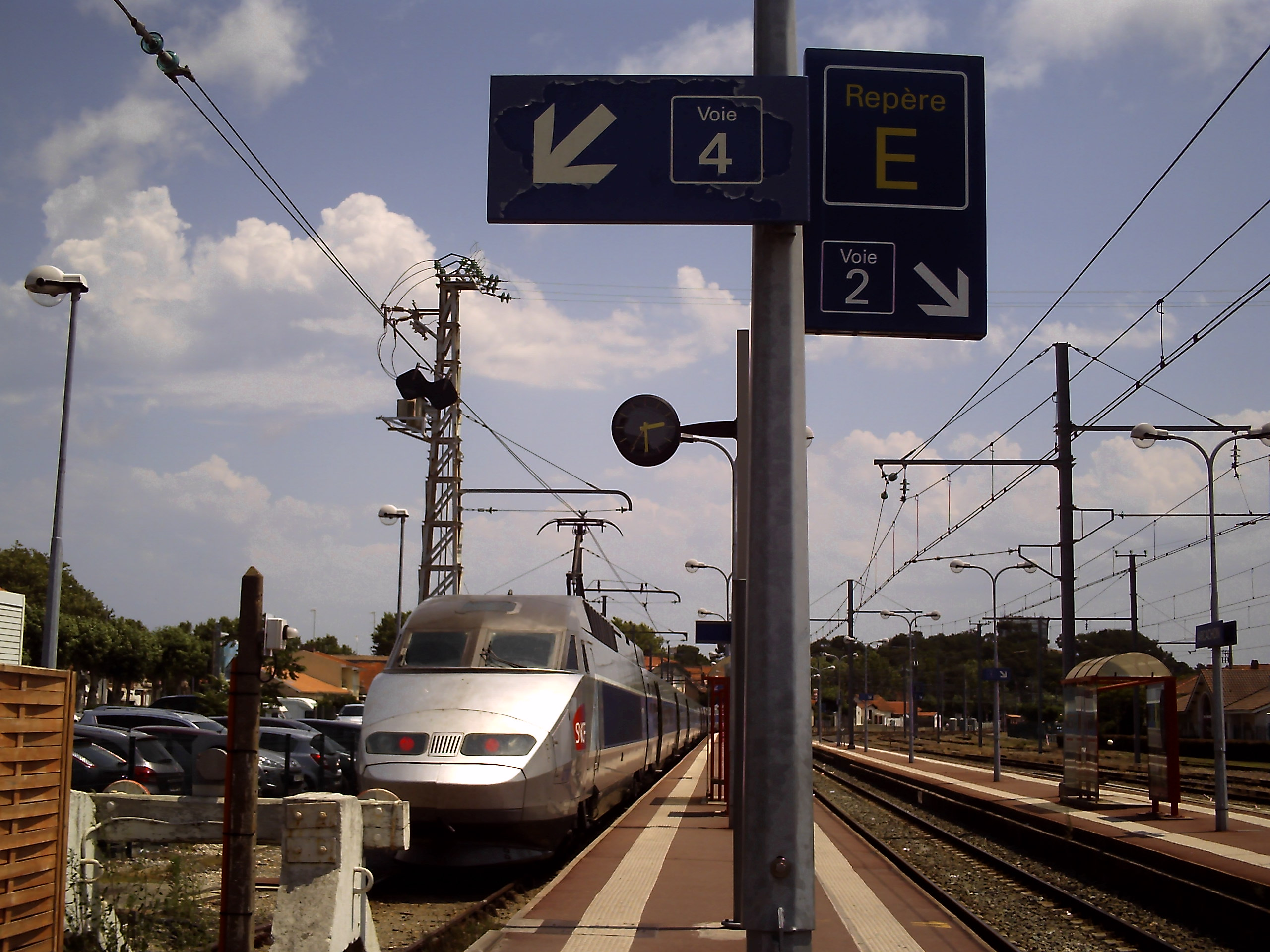 TGV en gare d'Arcachon